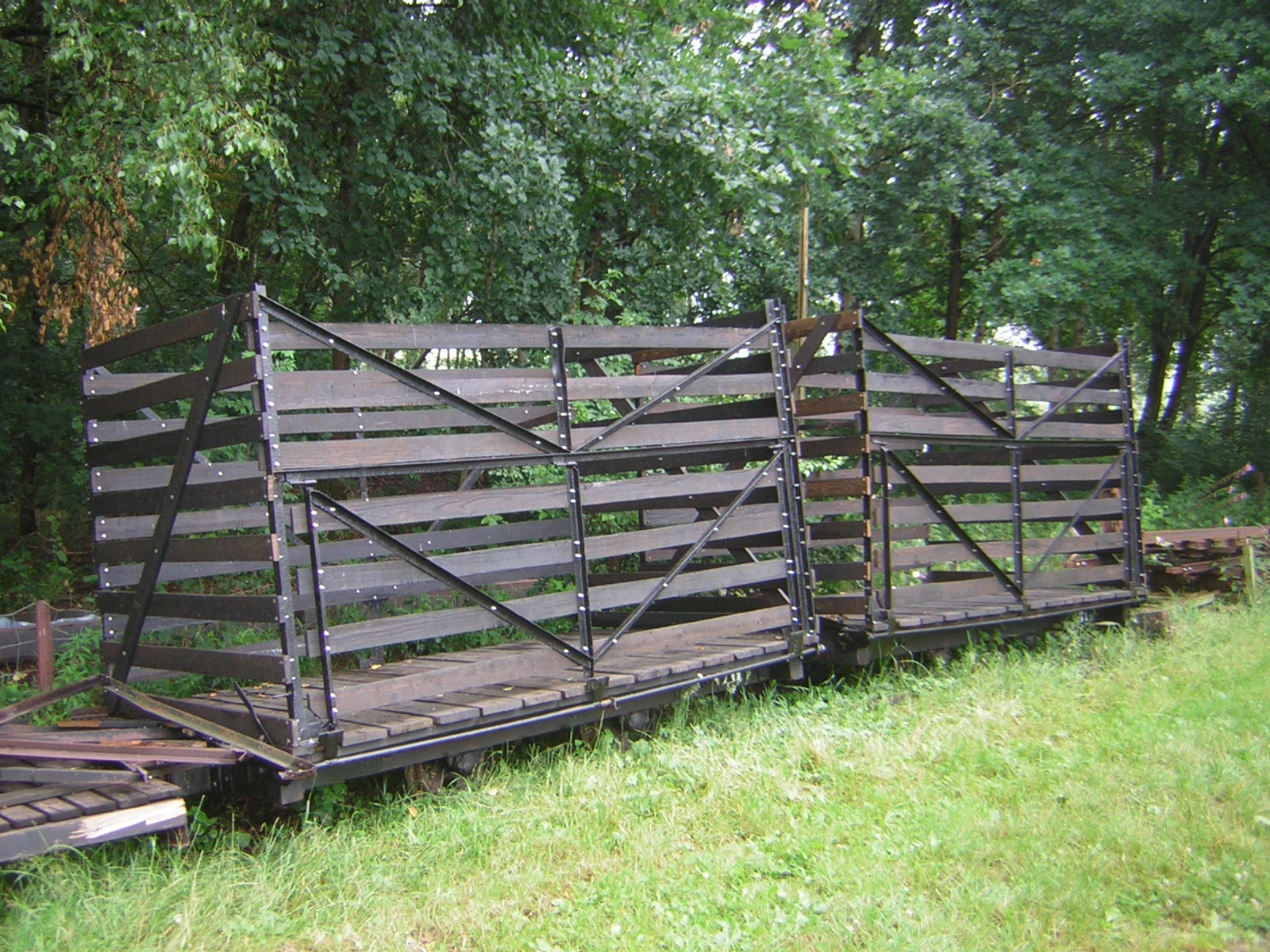 Bolsterwagen voor het vervoer van bolsterturf, (ex Griendsveen Mij, Erica).